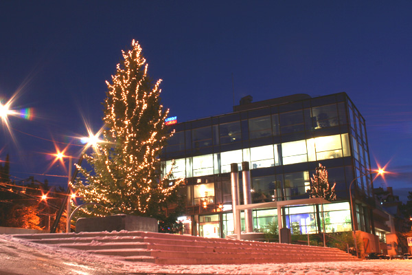 Weihnachtsfest auf dem Rigiplatz in Zürich. Im Hintergrund der Glaspalast der Credit-Suisse.